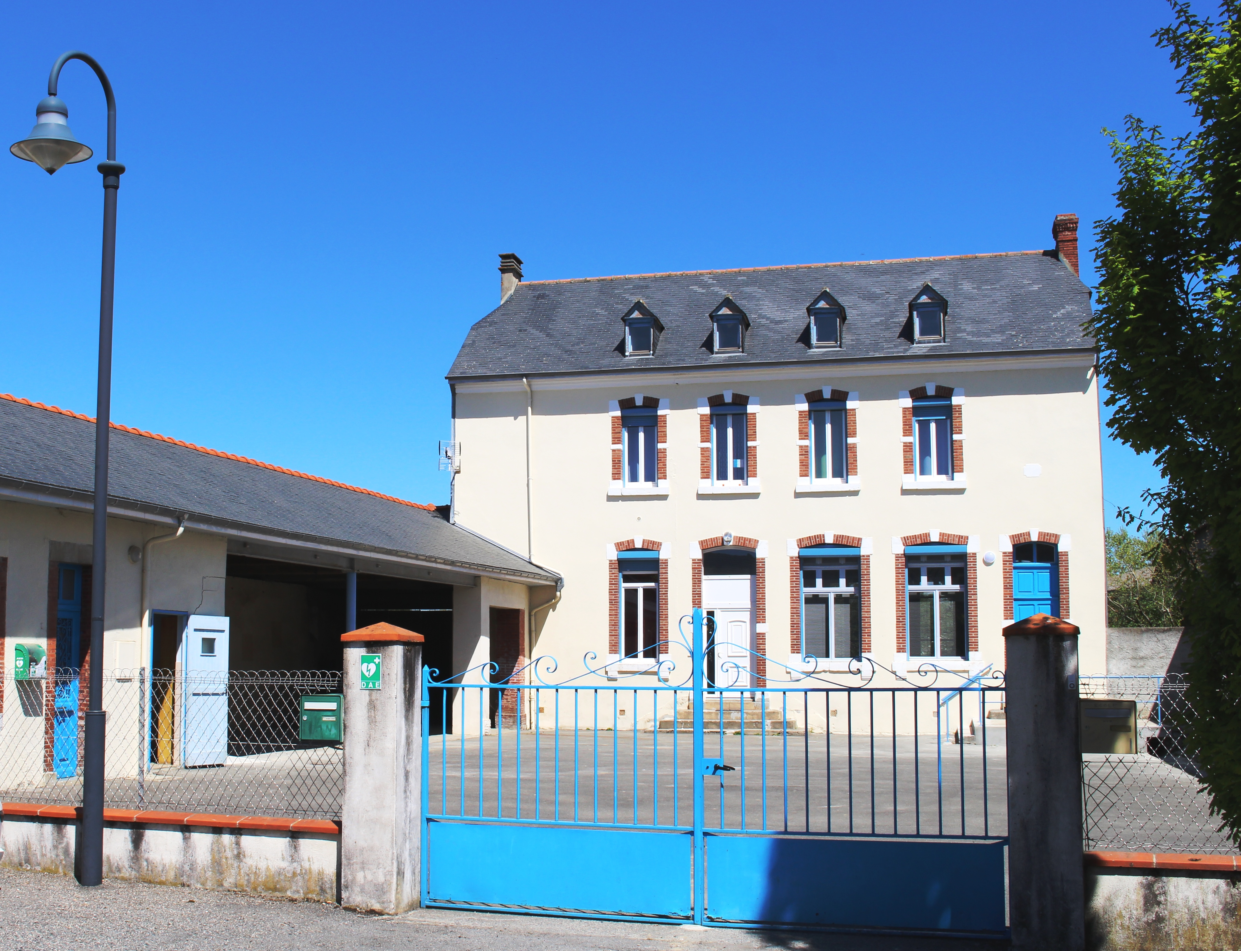 École de Bernac-Dessus (Hautes-Pyrénées)